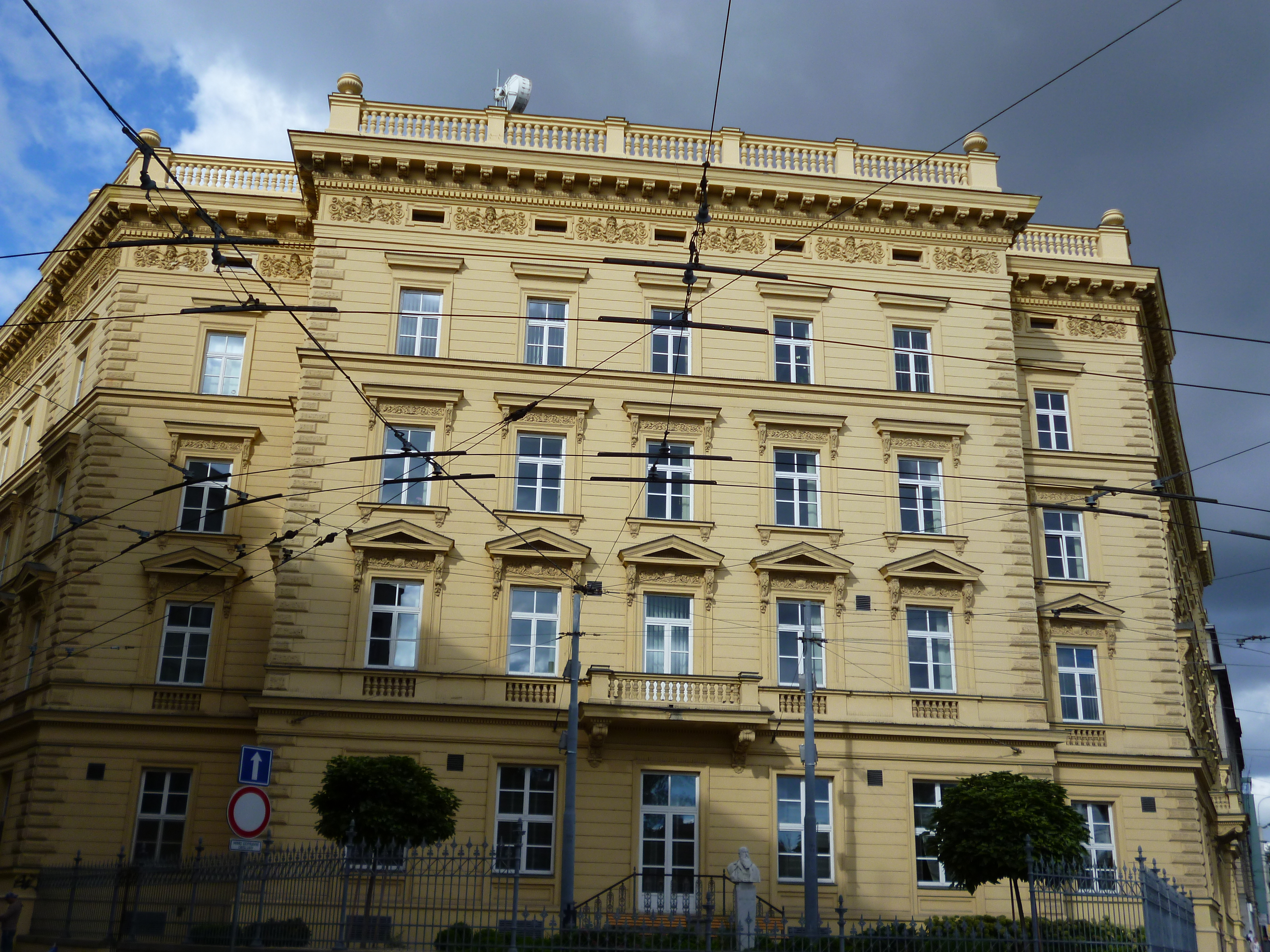 Palác Kounicův (Brno), Brno - město, Brandlova 617/1, Brno